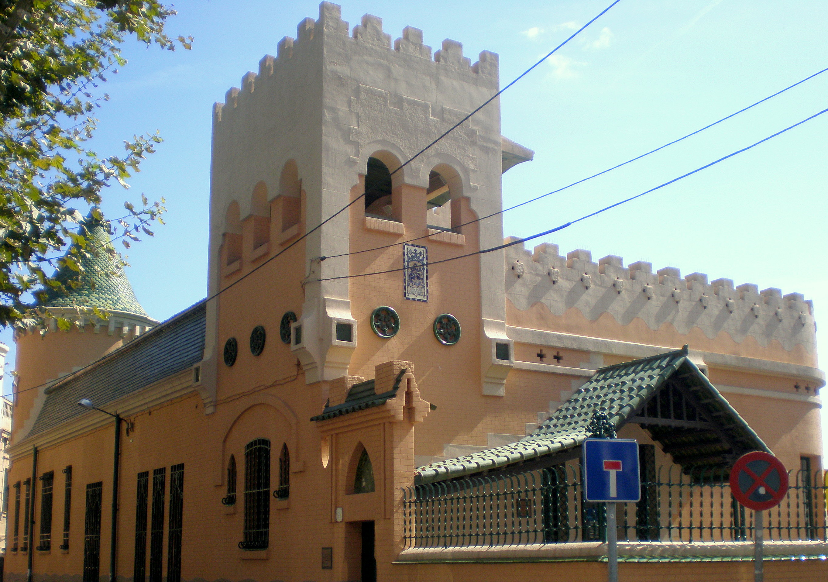 Casa Jaume Botey, obre de Joan Amigó i Barriga, situada a la plaça Pau Casals del barri de Dalt de la Vila de Badalona.